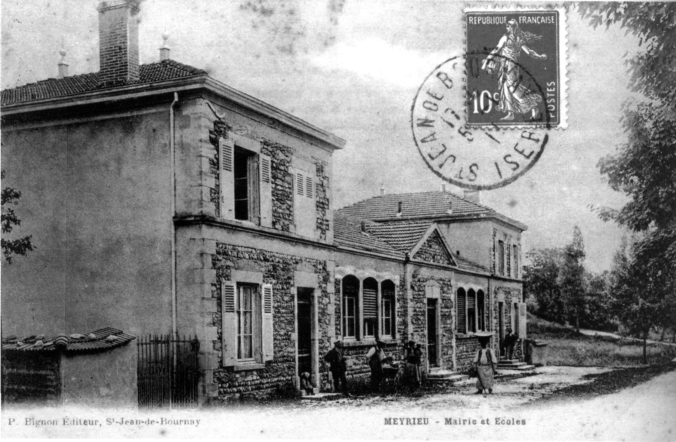 Meyrieu-les-Étangs, mairie et écoles en 1913.